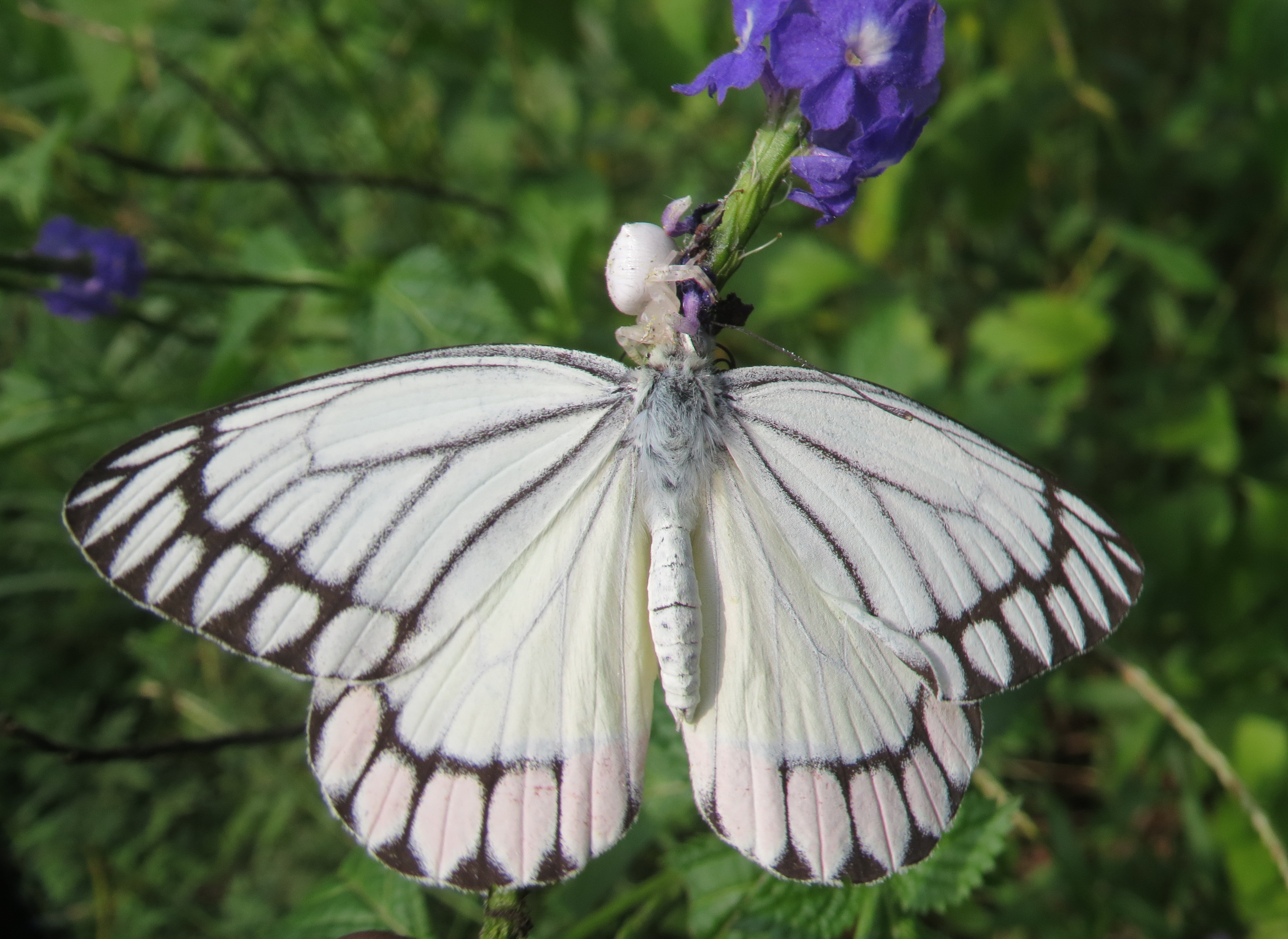 Photos takenat Kanhirakkolli and Peravoor